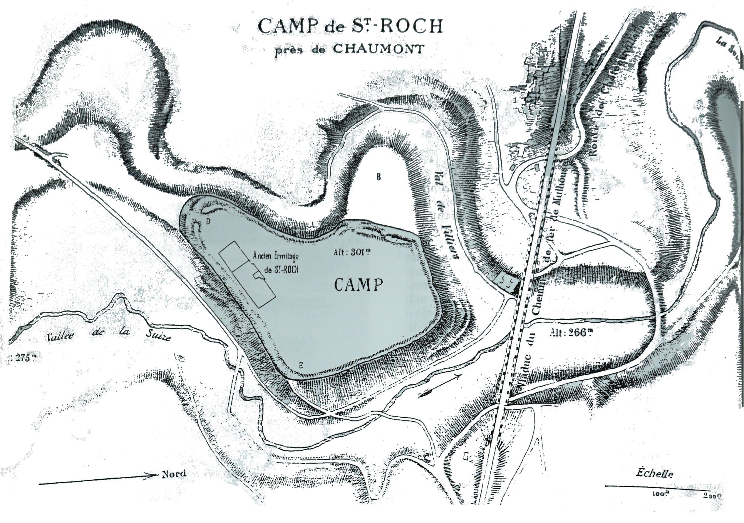 vue du plateau saint roch à chaumont.